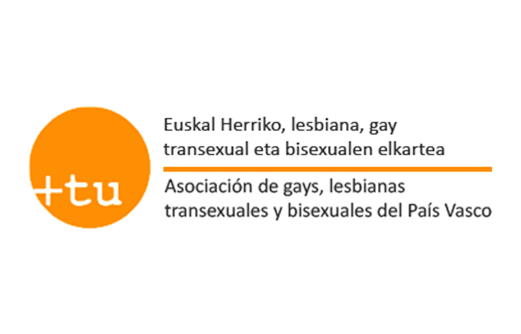 Logo de Gehitu